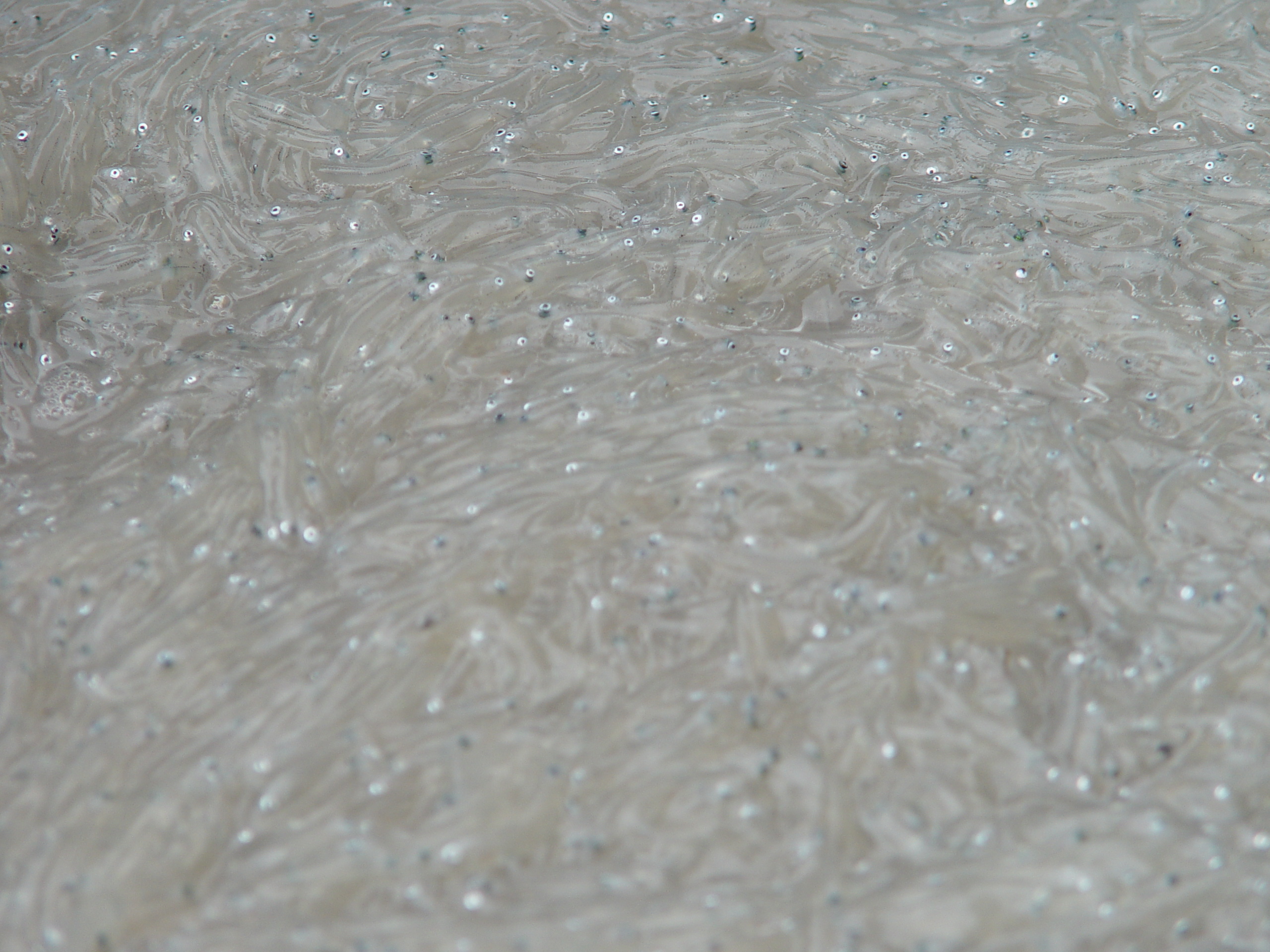 Alevins de sardines et d'anchois pêchés sur la côte d'azur. I "novellame" del pesce azzurro del Mar Mediterraneo (sardine e acciughe).